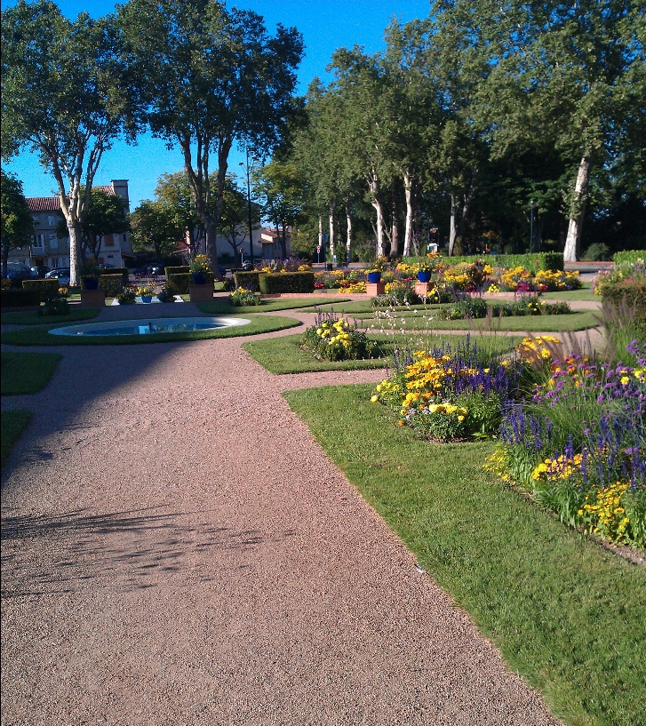 Jardin de l'Évéché, devant la Cathédrale Saint-Alain de Lavaur